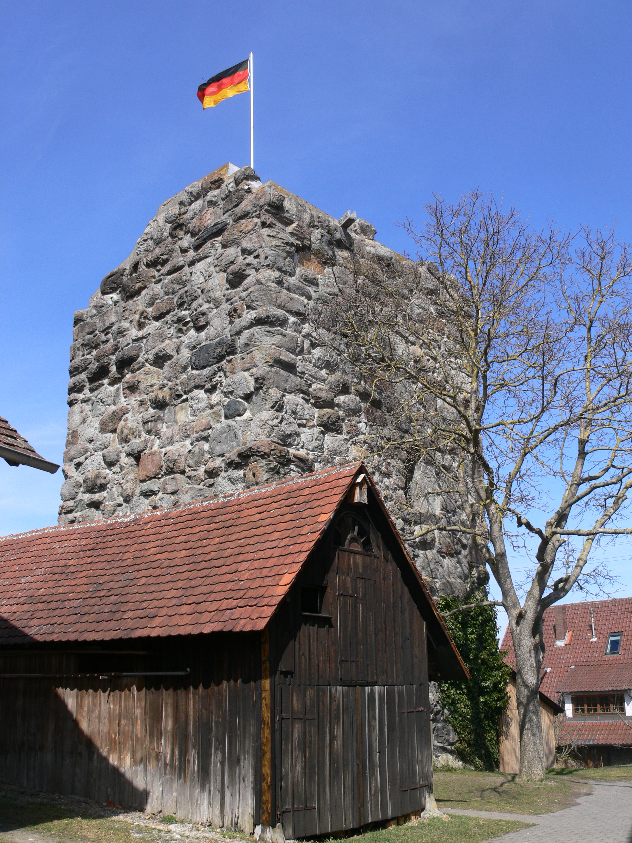 Fronhofen, Gemeinde Fronreute, Landkreis Ravensburg, Deutschland Turmruine